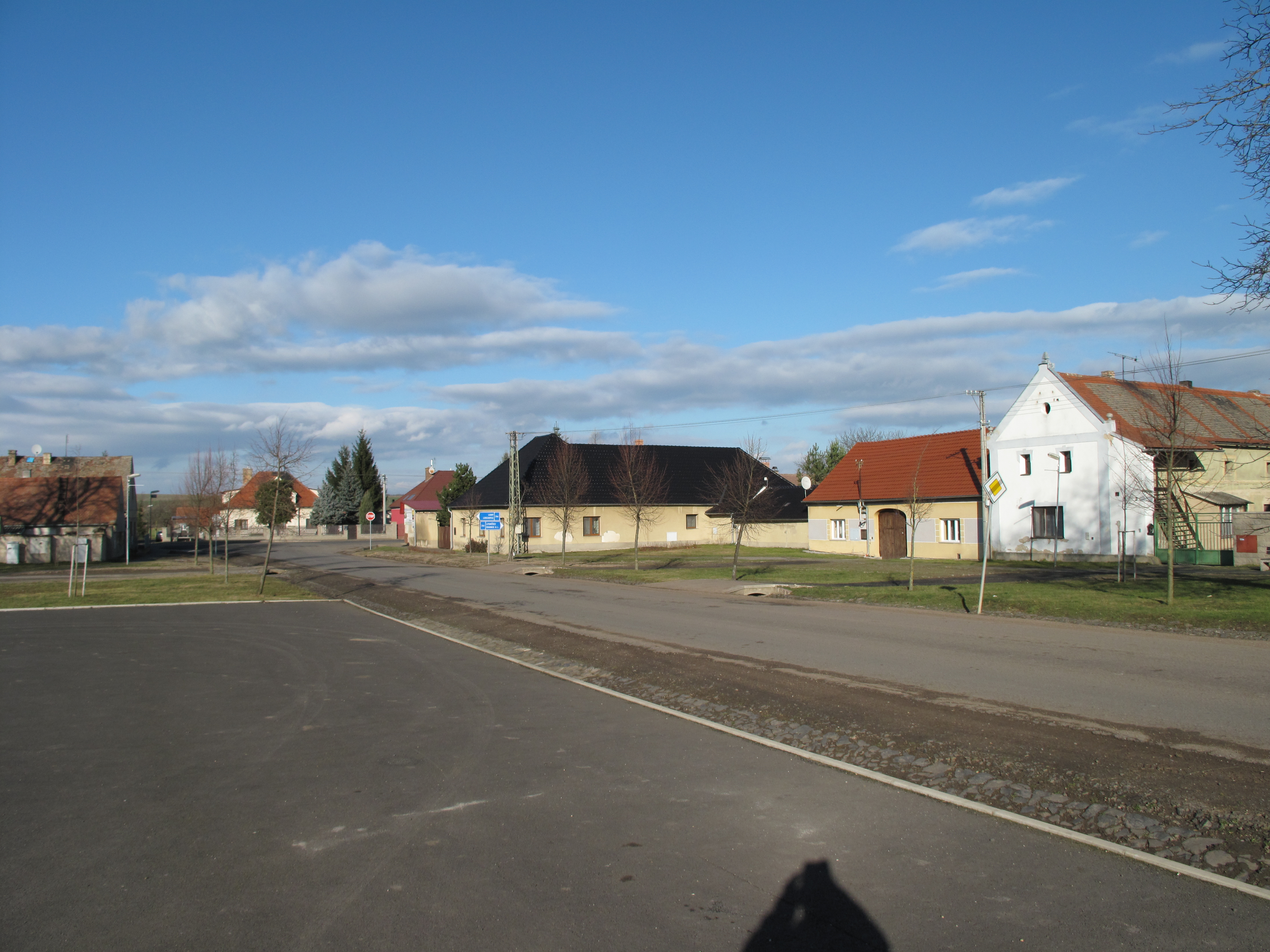 Náves v Radovesicích. Okres Litoměřice, Česká republika.